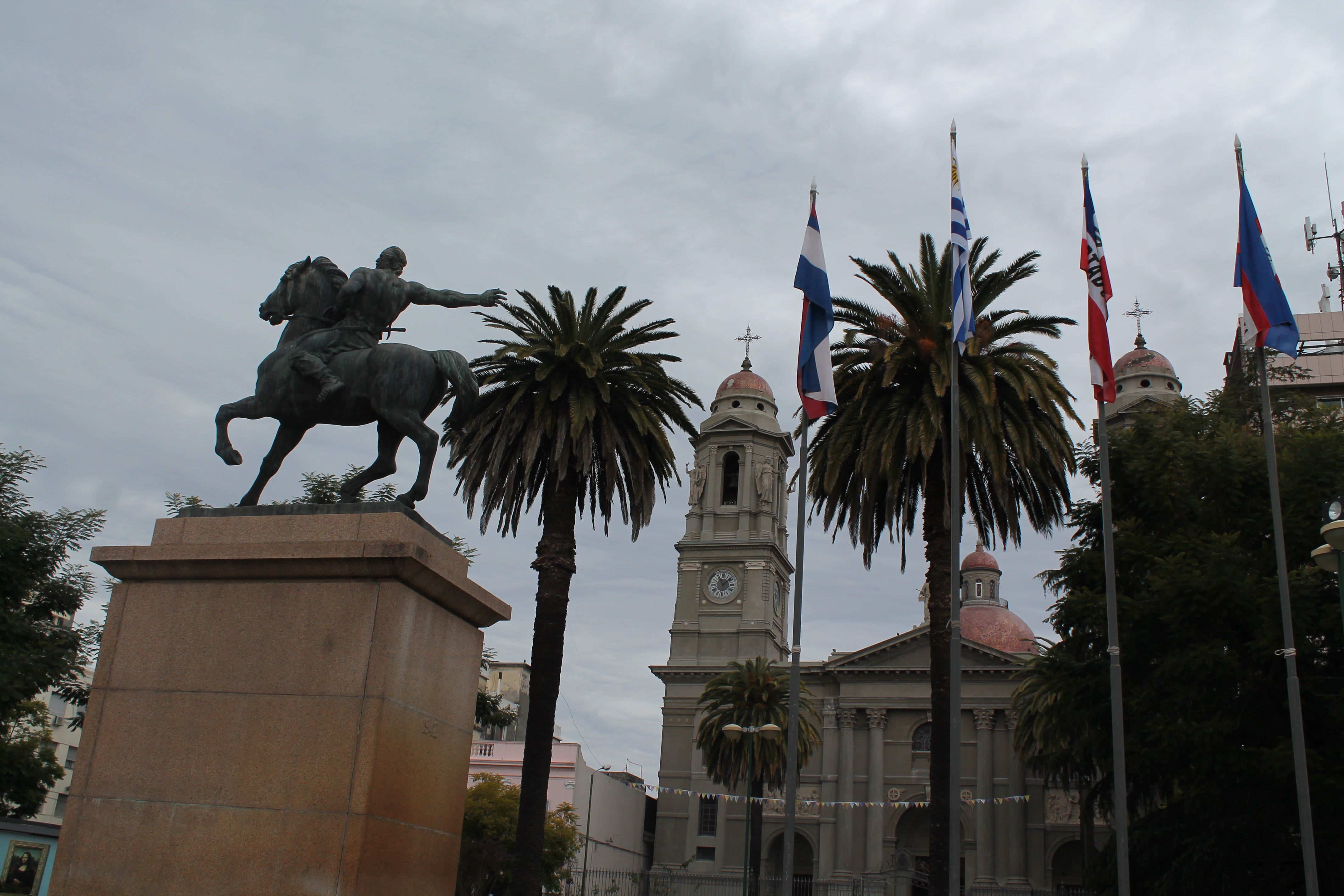 Plaza Independencia, Monumento al gaucho del "Grito de Asencio", Catedral "Nuestra Señora de las Mercedes"Mercedes, Soriano ,Uruguay.